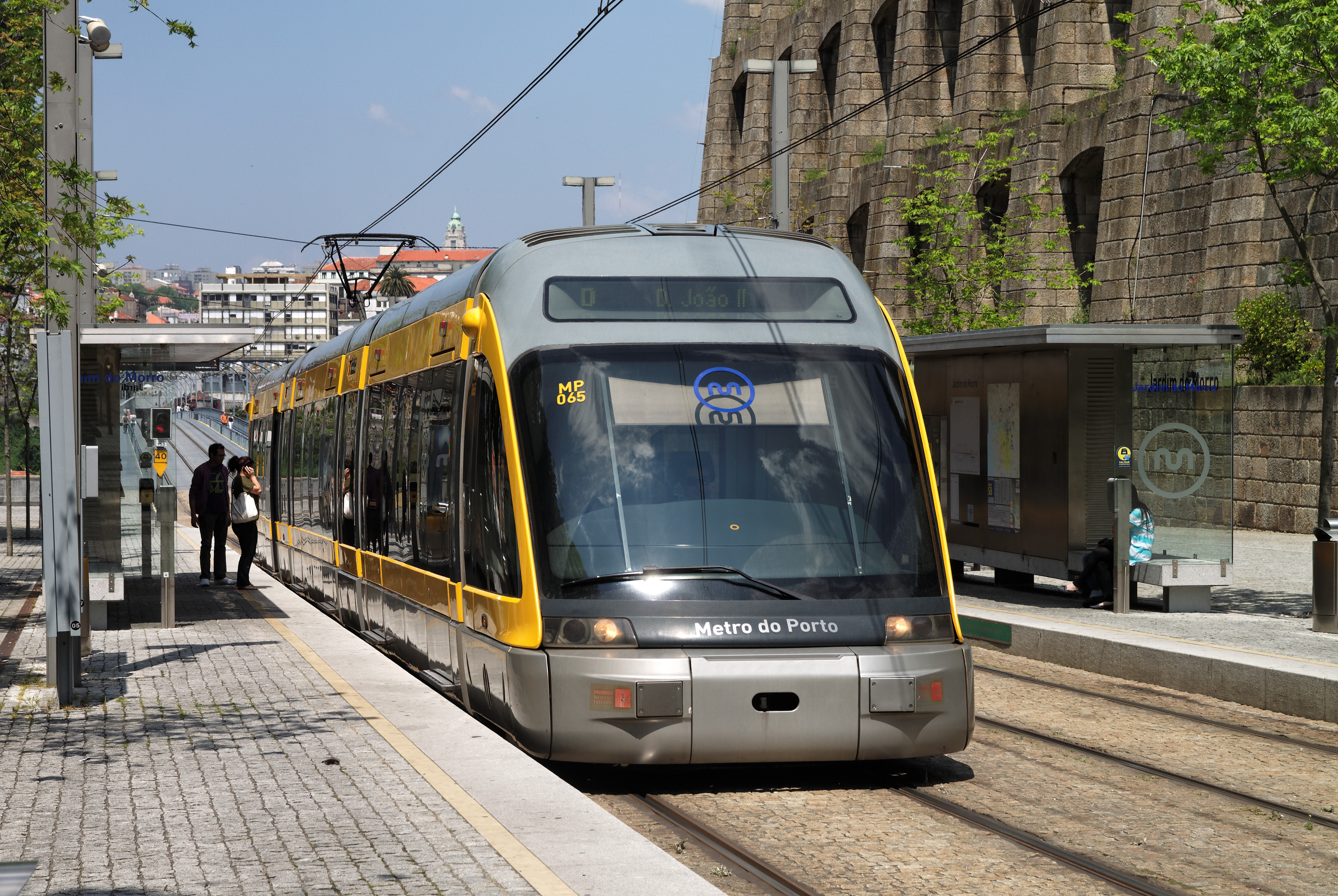 Tren del Metro de Porto en la estación Jardim do Morro. Gaia, Portugal.